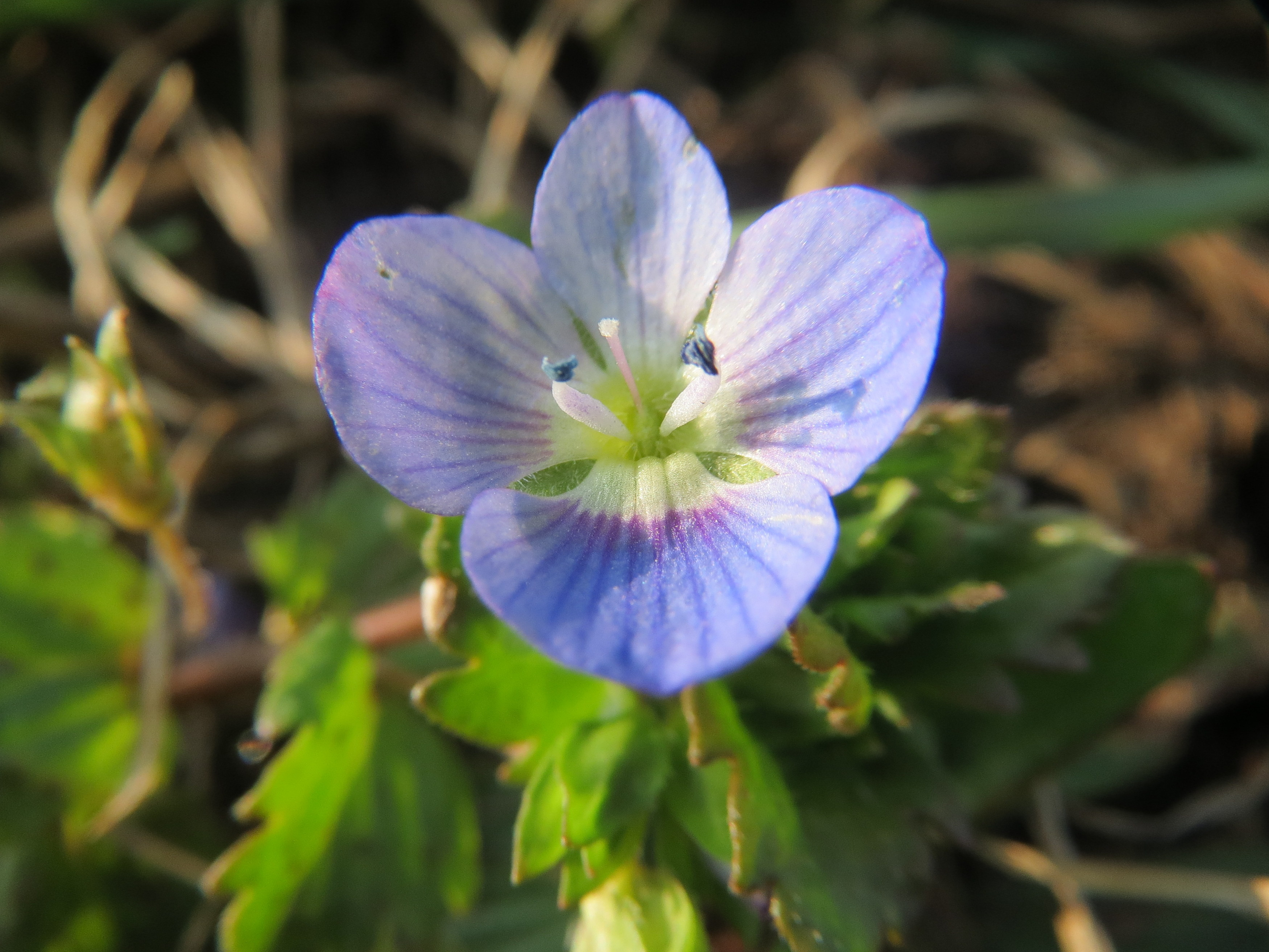 Persischer Ehrenpreis (Veronica persica) im Hockenheimer Rheinbogen